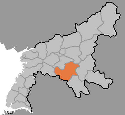 Map of Songchon, Pyongan-namdo, DPRK, 2006